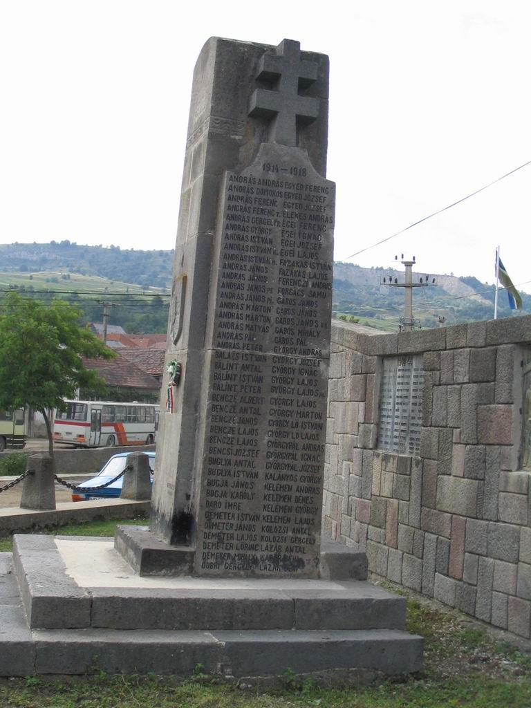 Lövéte - emlékmű, az I. világháborúban elesettek neveivel